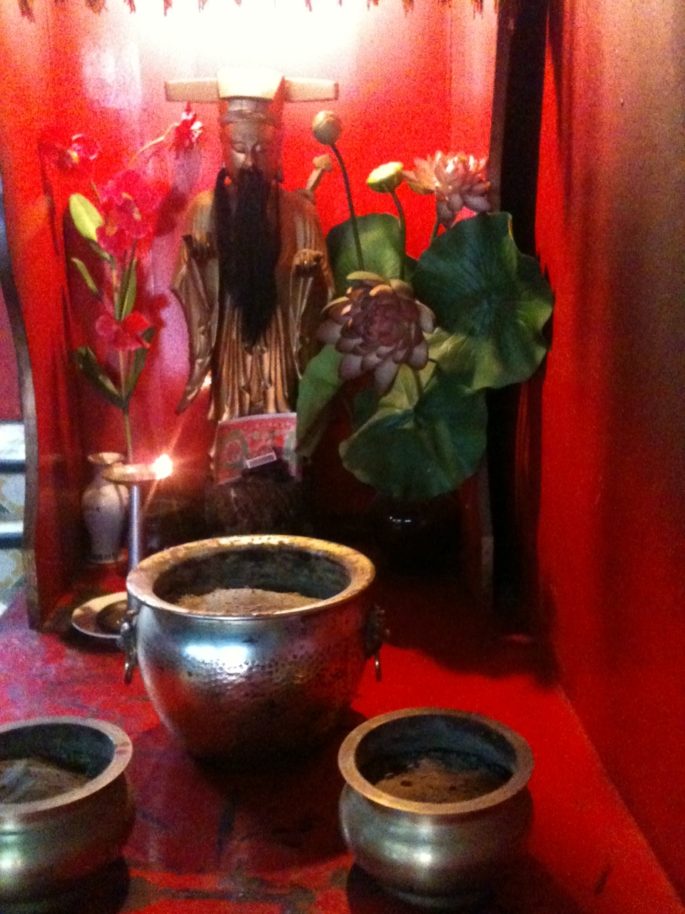 LU ZU -Taoiste célèbre